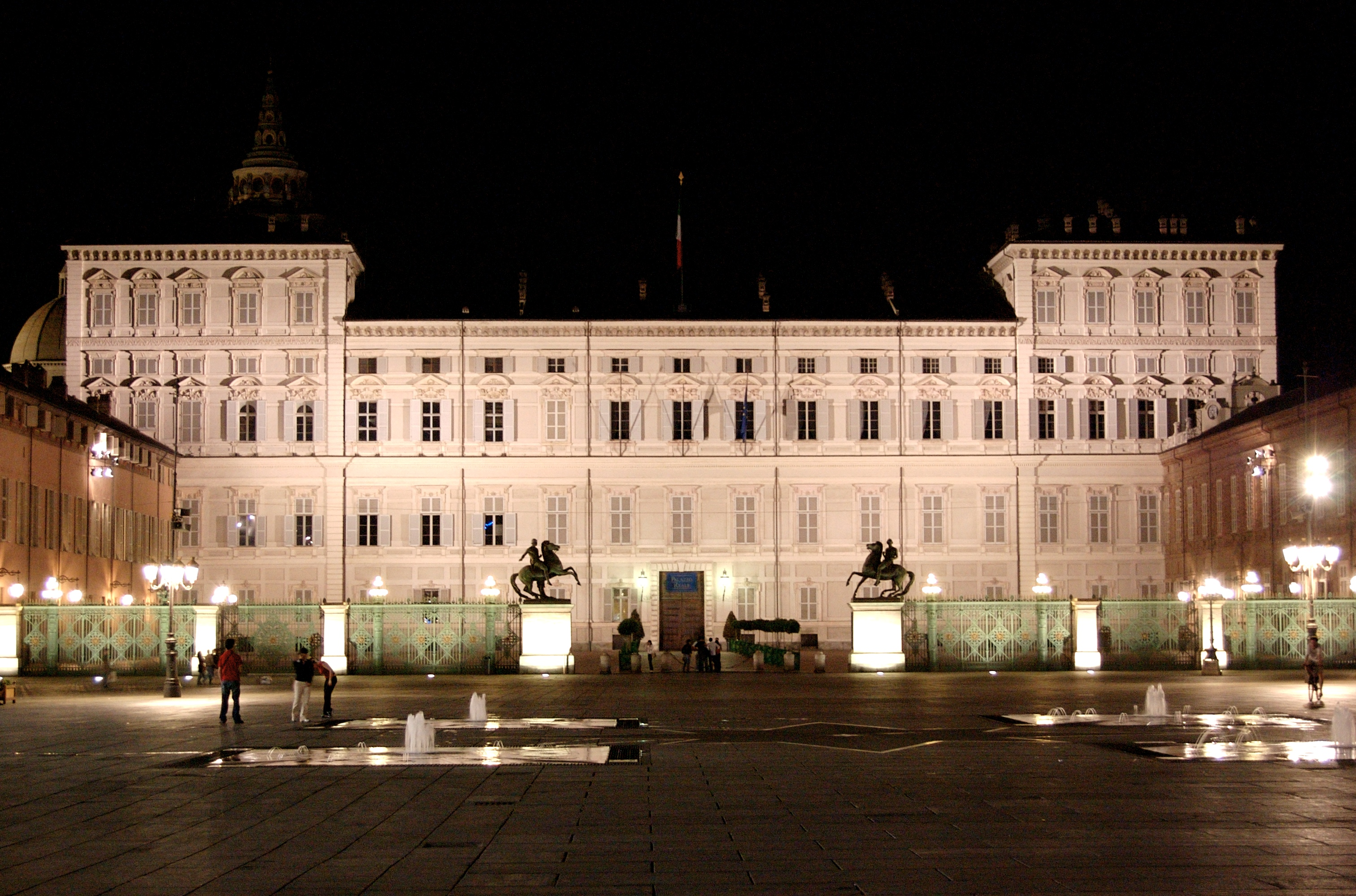 Palazzo Reale di Notte, Torino